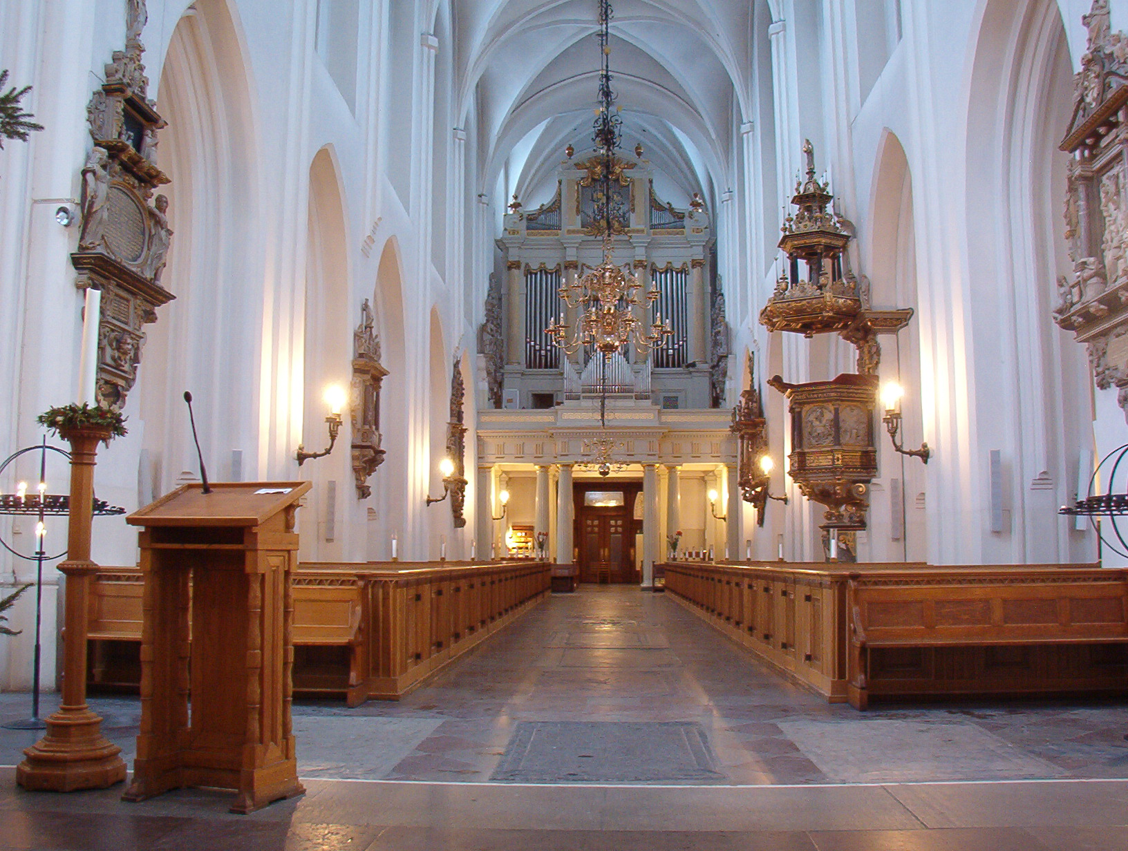 Sankt_Petri_kyrka, Malmö, interior from altar Date december 2005